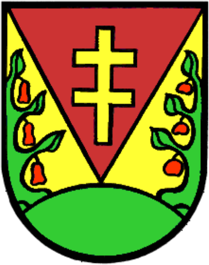 Das Wappen zeigt im unteren Teil einen grünen Hügel, der Wörterberg symbolisiert. Auf ihm wachsen ein Apfel- und ein Birnbaum, diese stehen für die Streuobstwiesen. Das Doppelkreuz stellt das Kreuz von Papst Silvester II. dar, das er König Stephan von Ungarn verliehen hat. Es soll an die Kapelle zum Hl. Stephan erinnern. Die rot-goldenen Felder sollen die Verbundenheit zum Burgenland symbolisieren. Das Gemeindewappen wurde von Thomas Resetarits entworfen.